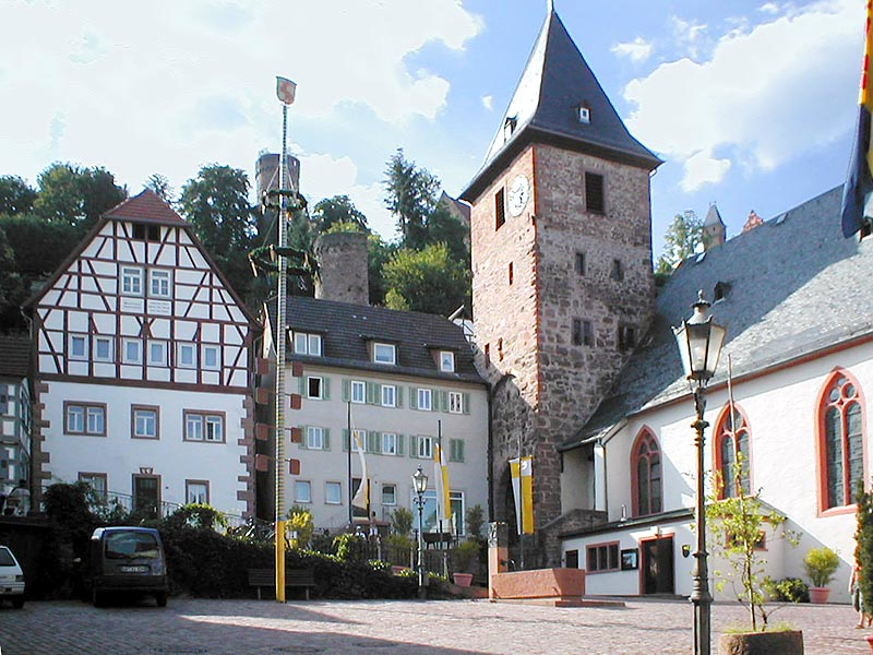 Marktplatz von Hirschhorn (Neckar) mit der katholischen Pfarrkirche zur Unbefleckten Empfängnis Mariä